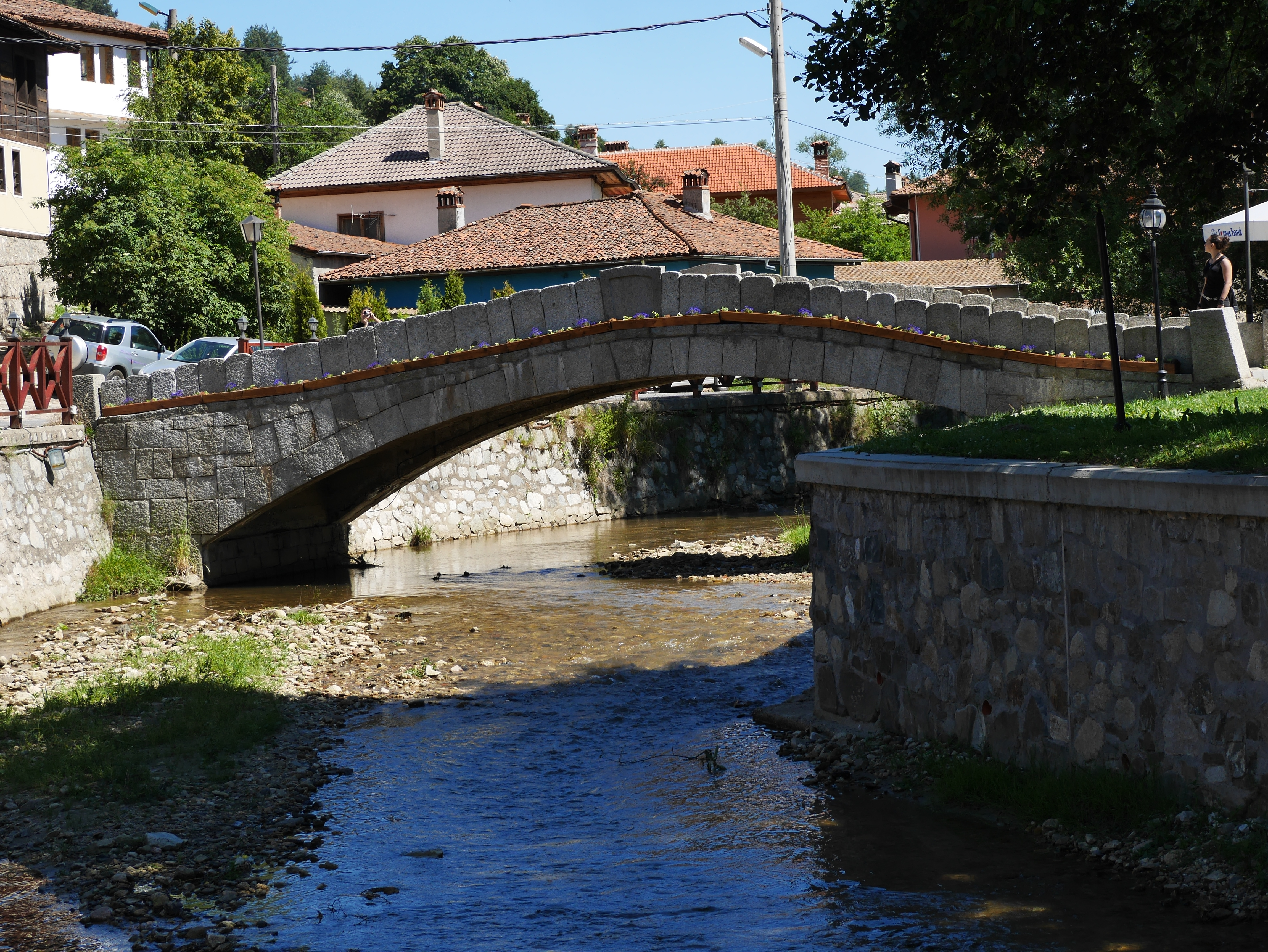 Град Копривщица